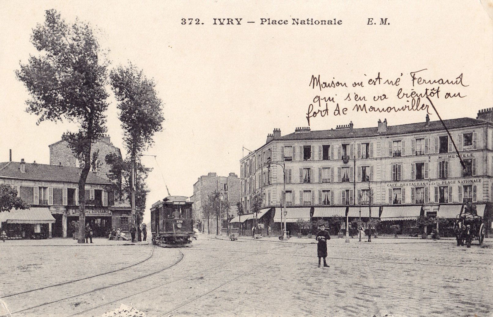 Carte postale ancienne éditée par EM, n°372 :IVRY - Place Nationale